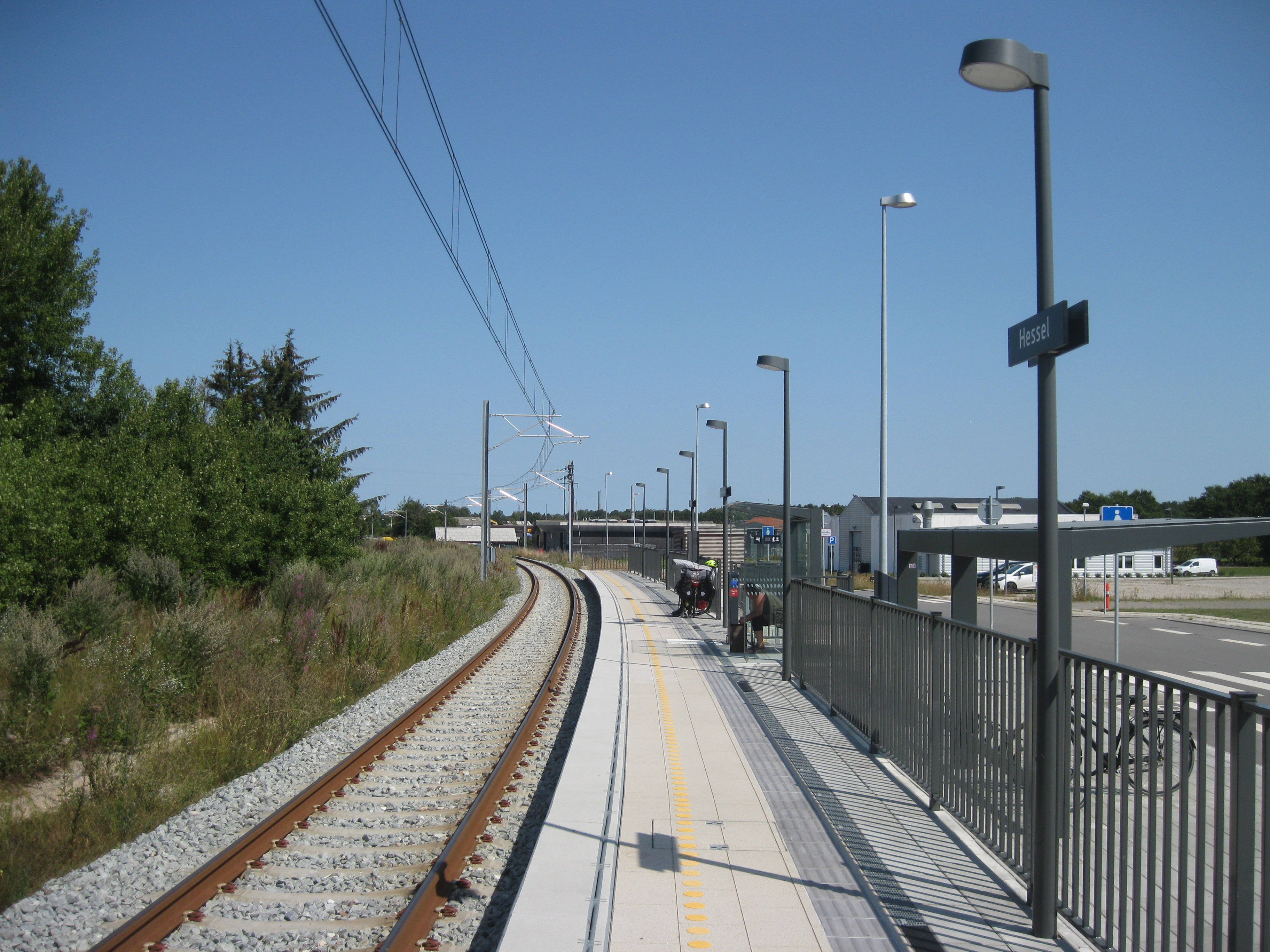 Hessel Station, Letbanen, Norddjurs